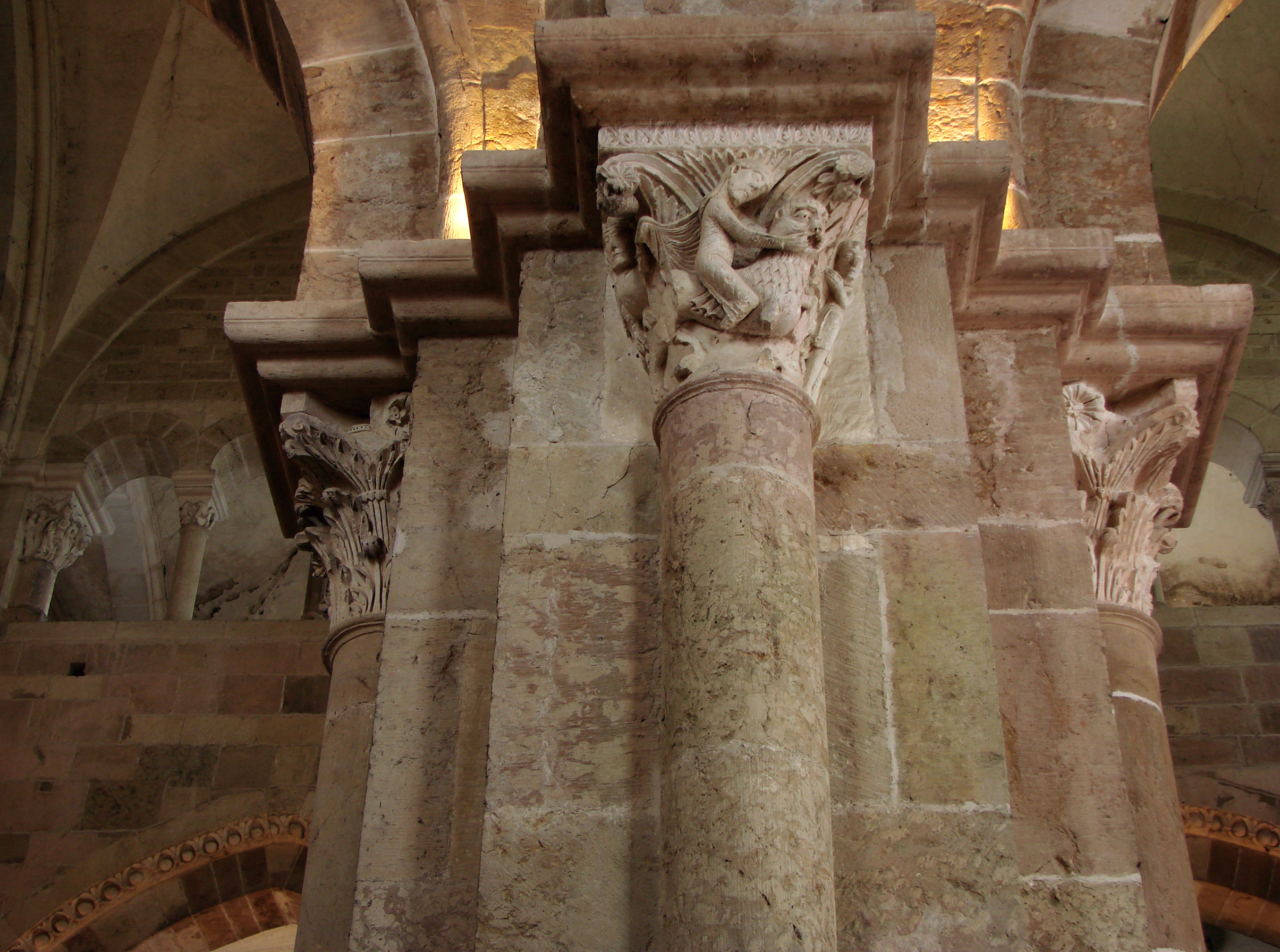 Pile du narthex, milieu du 12ème siècle. Chapiteau: Samson terrassant le lion. Basilique Sainte-Marie-Madeleine de Vézelay.